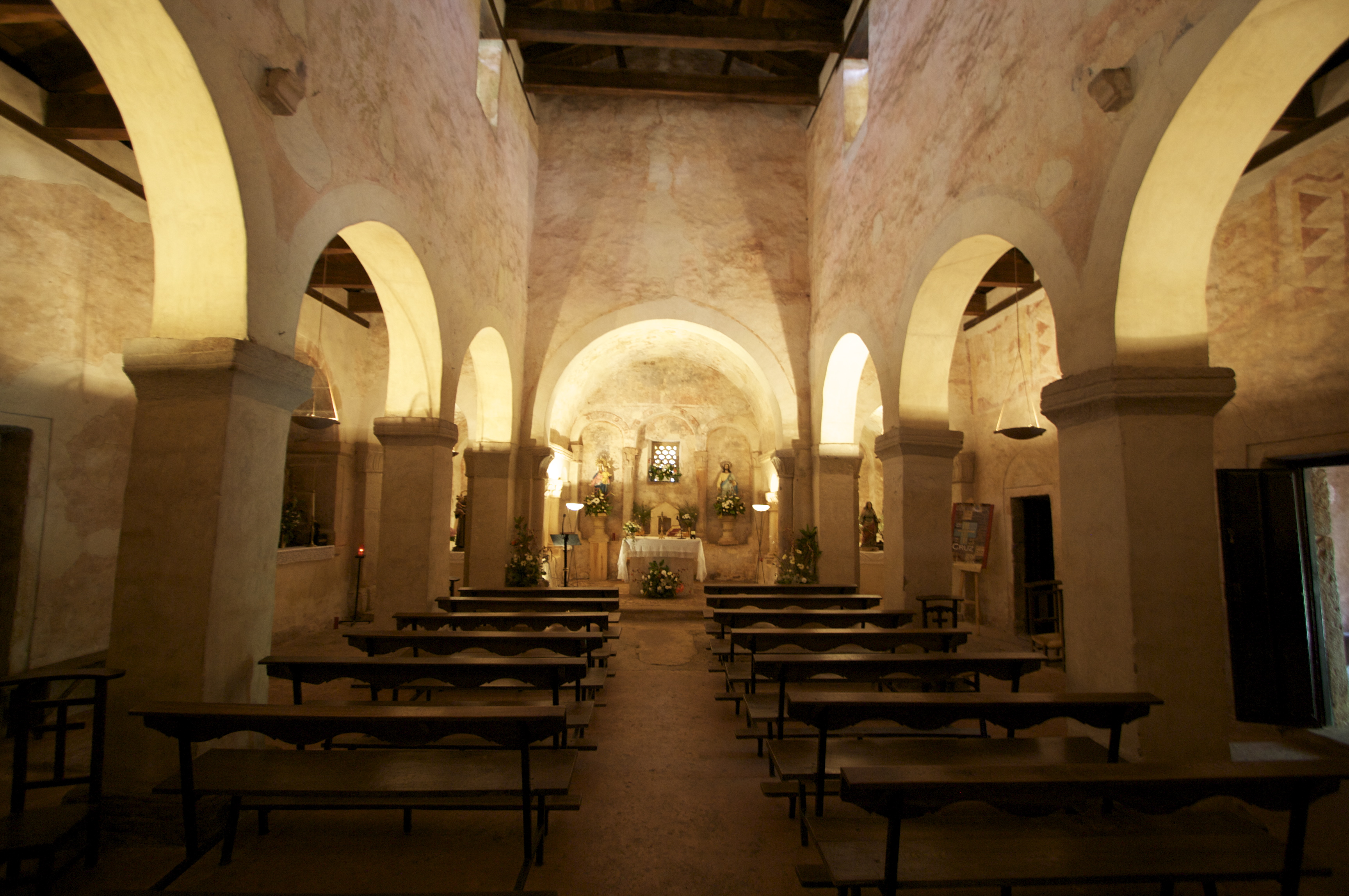 Iglesia de San Salvador (Priesca)